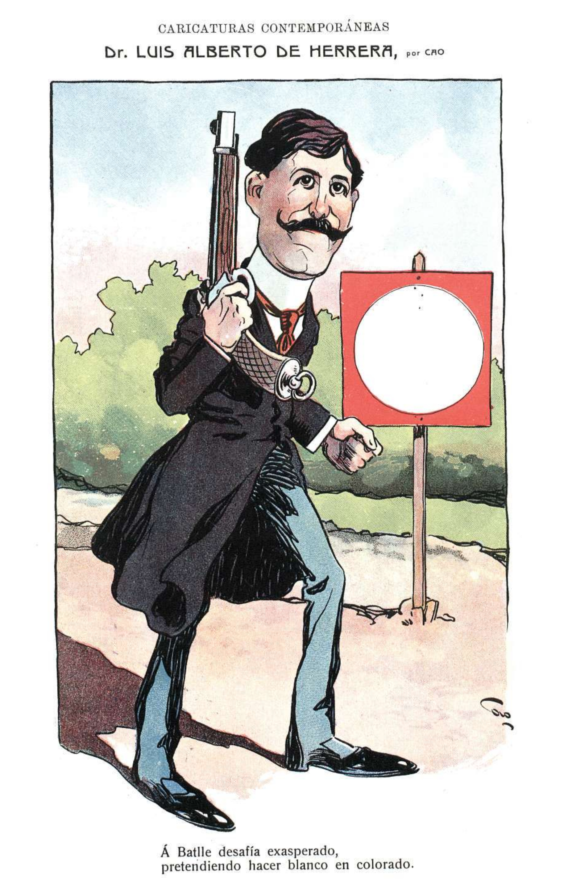 Caricatura hecha por el dibujante José María Cao Luaces del político uruguayo Luis Alberto de Herrera, aparecido en la revista argentina Caras y Caretas en 1906.